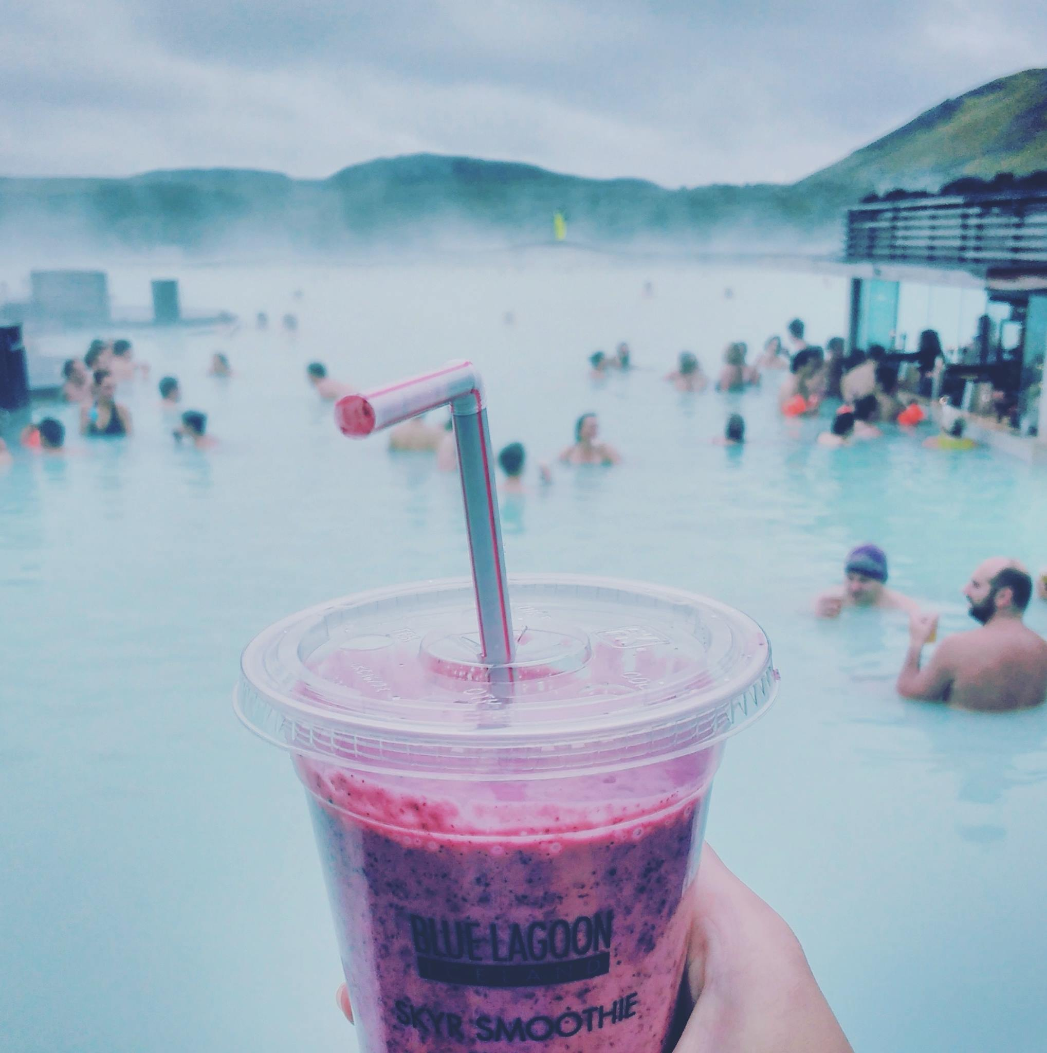 Plava laguna je danas jedna od najpoznatijih i najposjećenijih turističkih atrakcija na Islandu